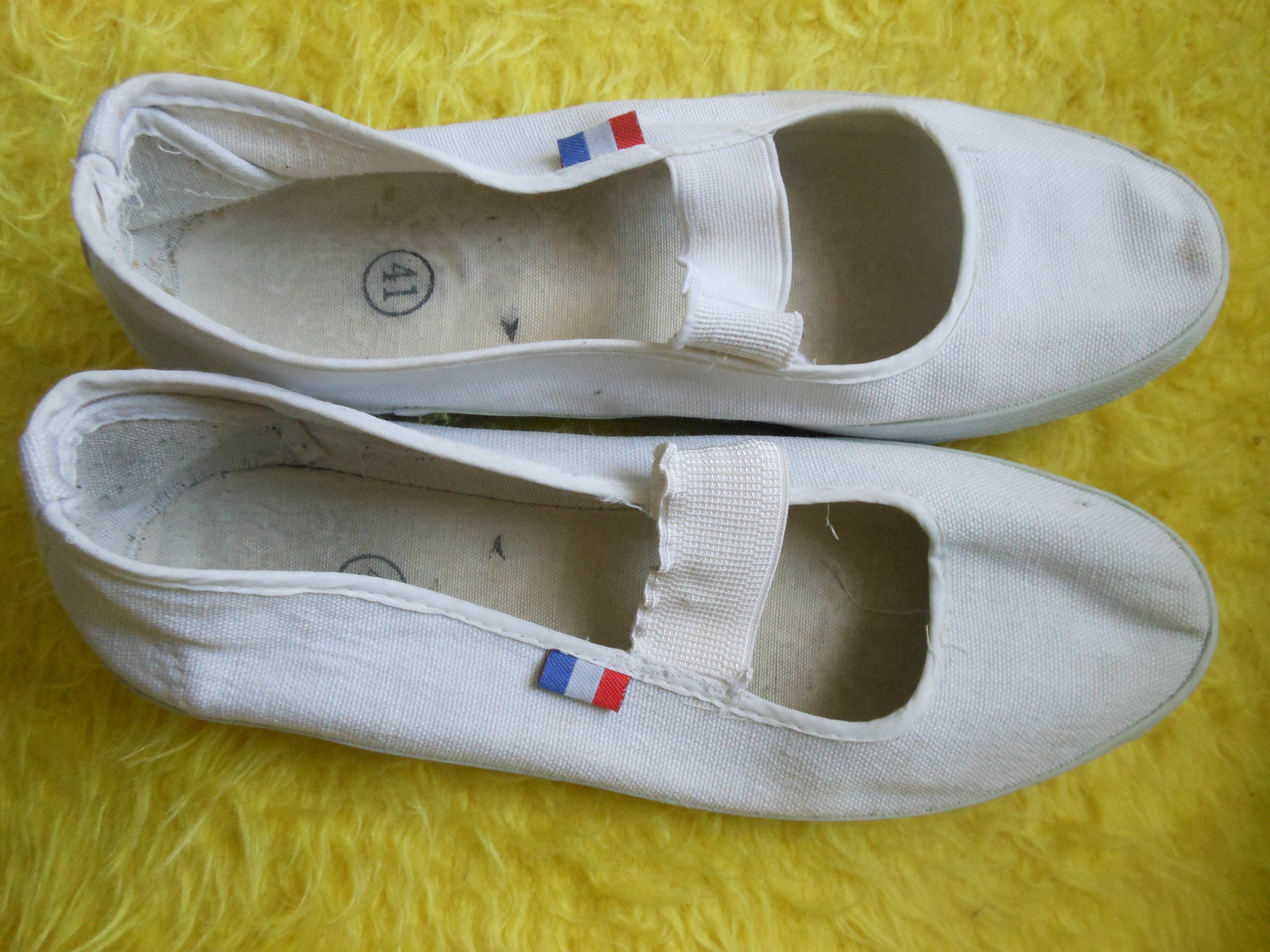 Jarmily - klasická obuv do tělocviku